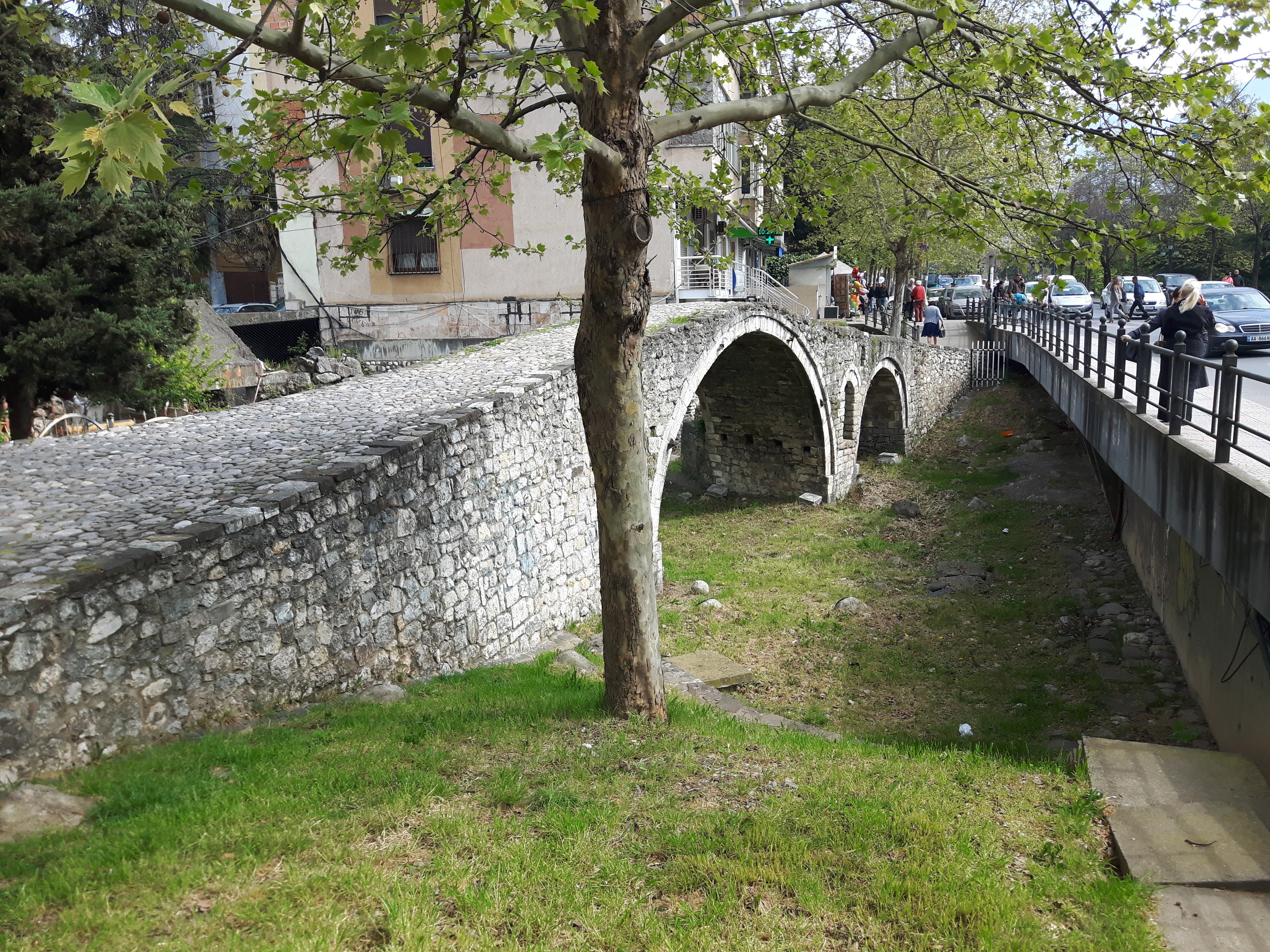 Ura e Tabakeve